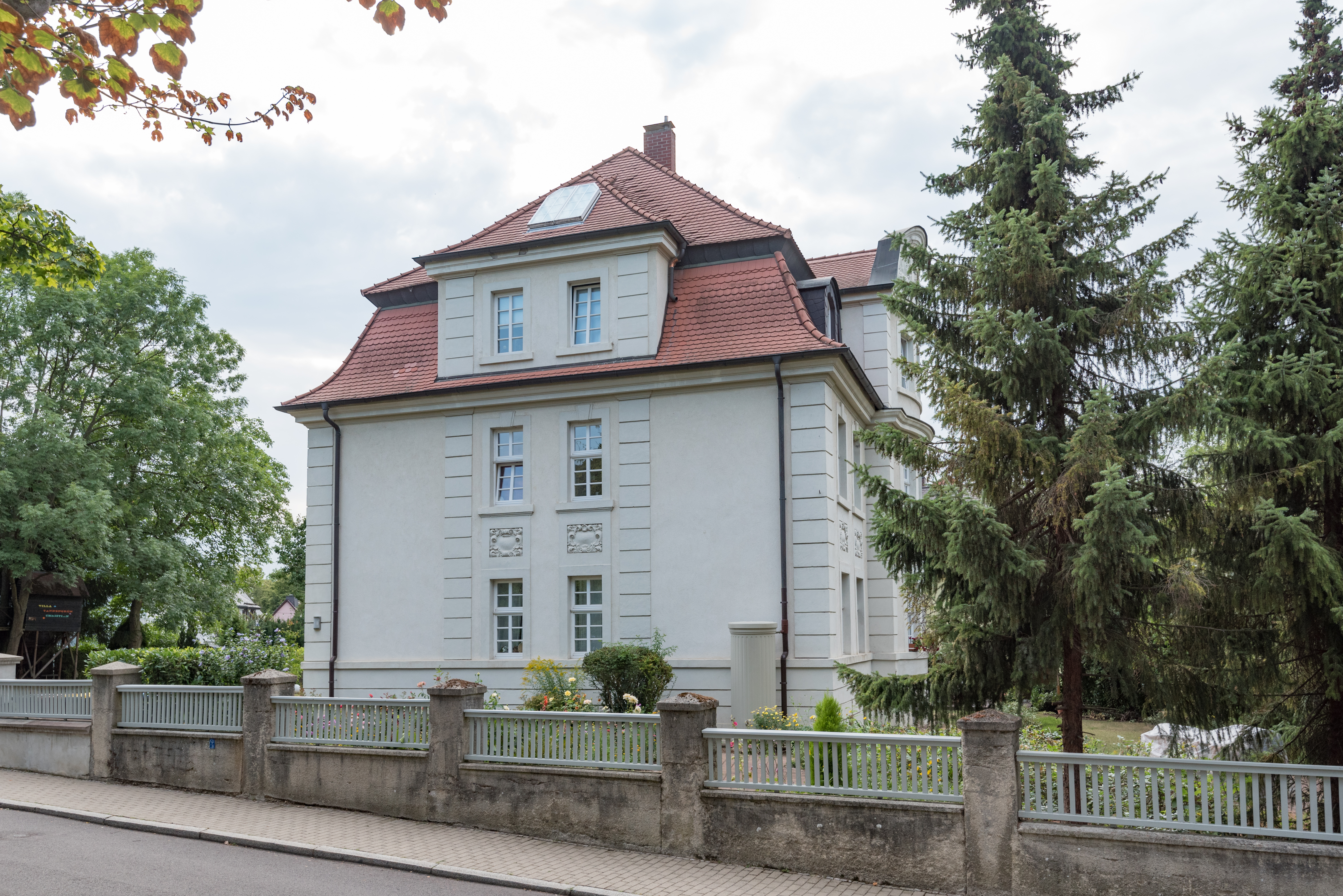 Weißenfels, Francoisstraße 11